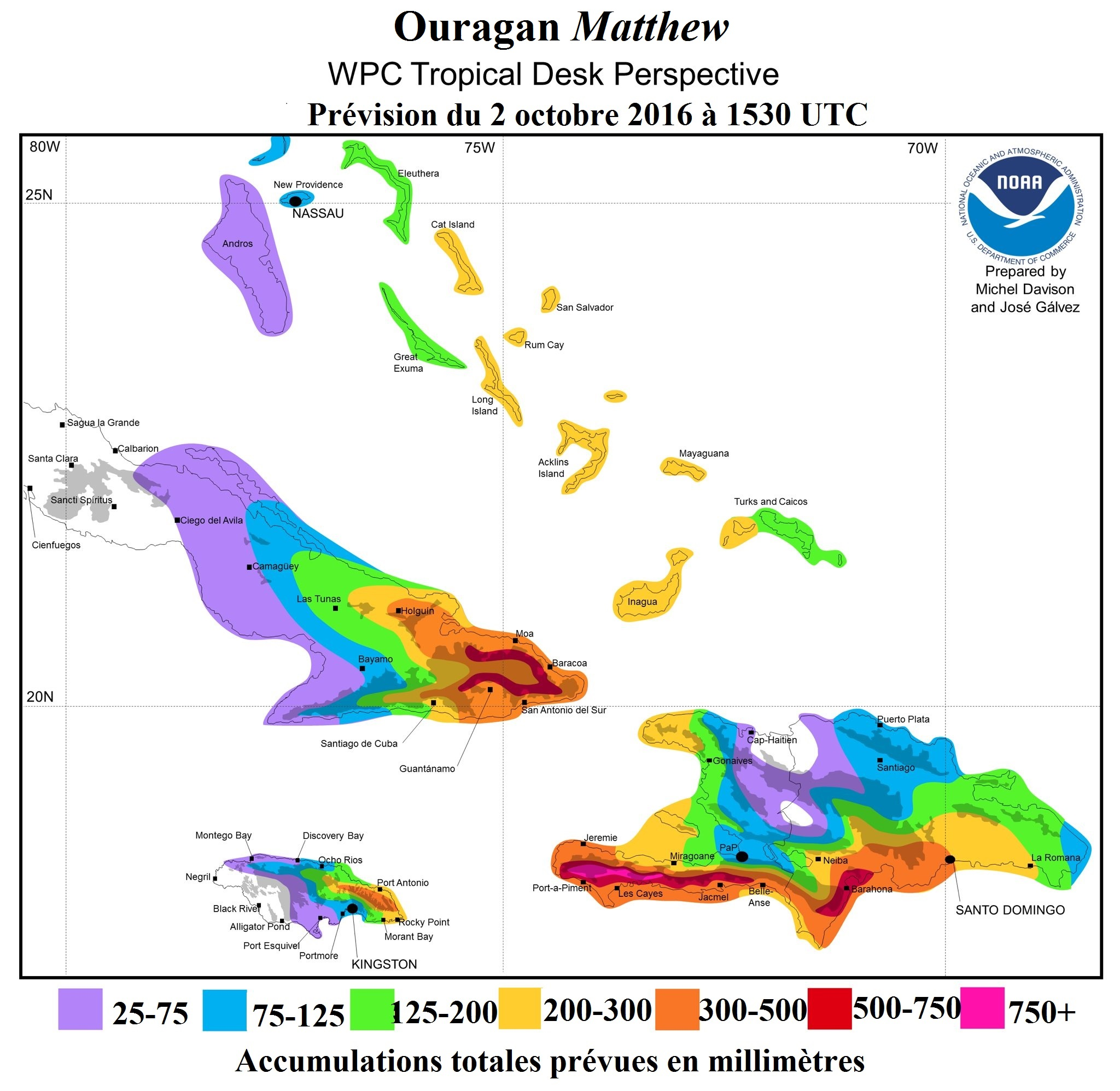 Accumulations prévues le 2 octobre 2016 pour le passage de l'ouragan Matthew sur les Grandes Antilles par le WPC du National Weather Service américain.